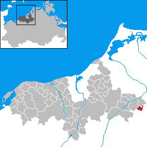 Nustrow in Mecklenburg-Western Pomerania - District Bad Doberan